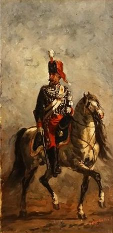 Soldat călare